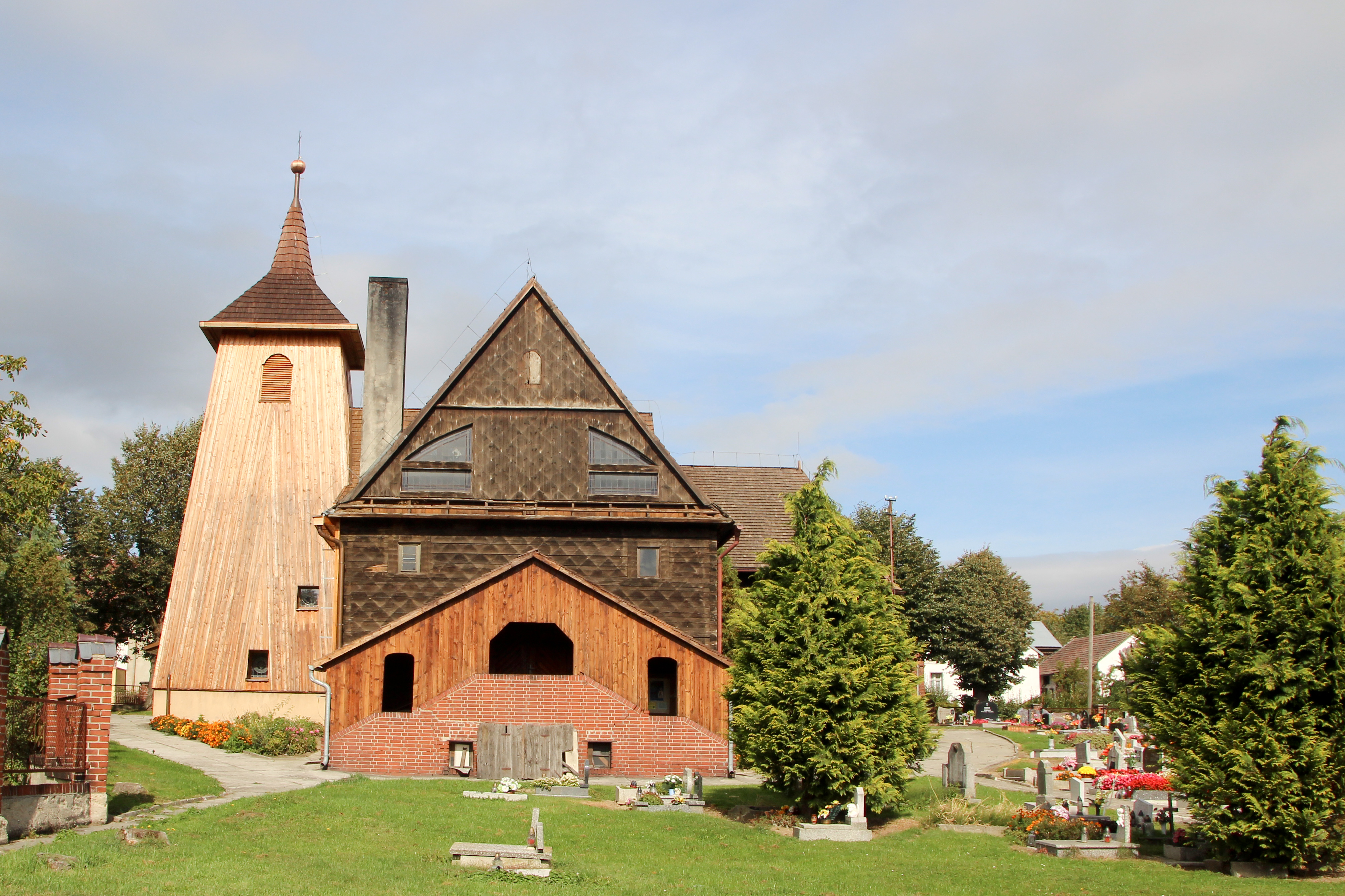 Radoszowy, ul. Główna 46 - rzymskokatolicki kościół parafialny pw. św. Jadwigi Śląskiej, 1929